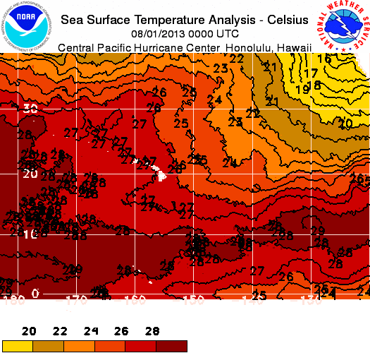 Temperatura superficial del Océano Pacífico al SE del archipiélago de Hawai. Puede observarse la desviación de las temperaturas más cálidas unos 10º al norte del ecuador geográfico